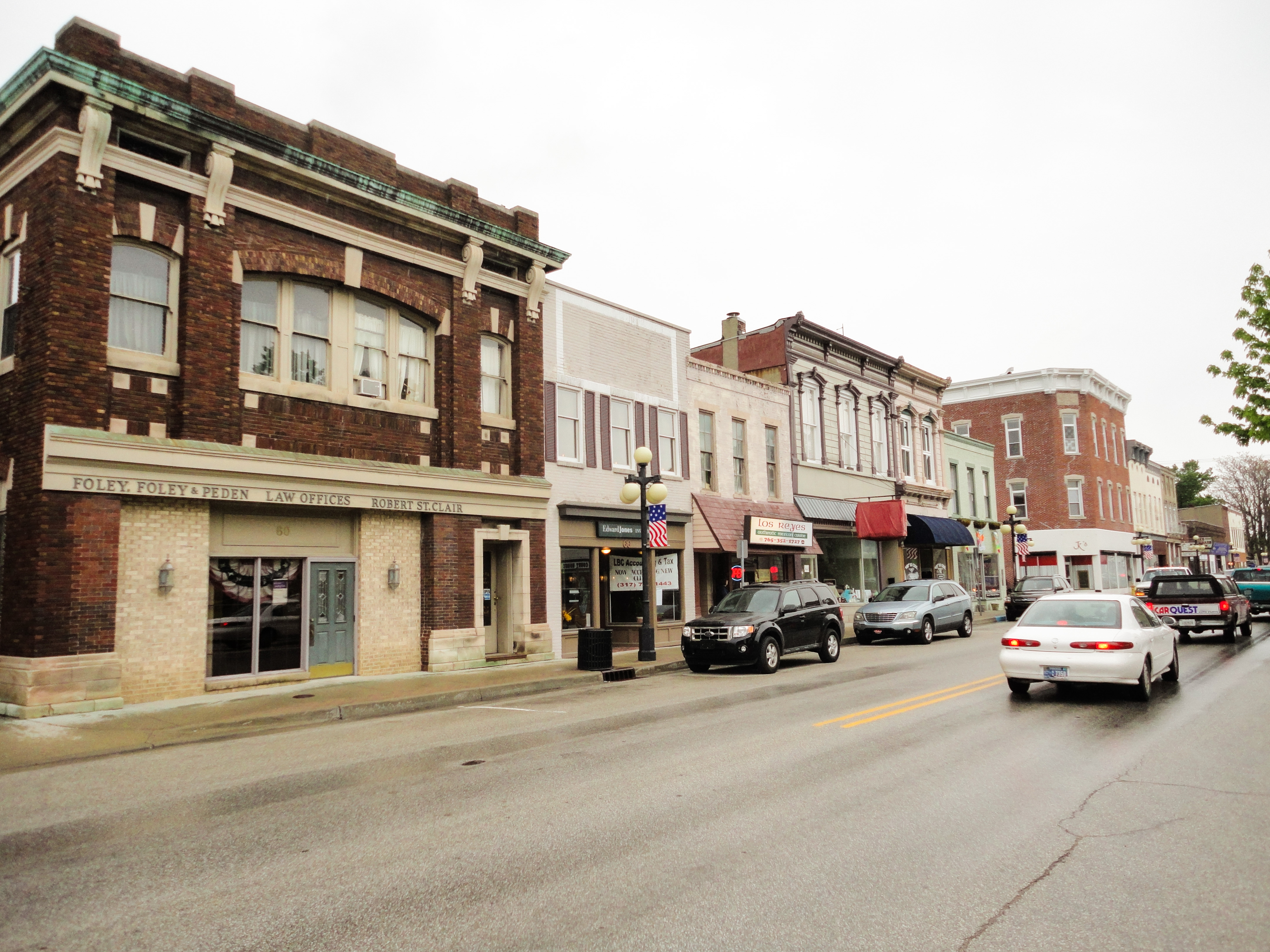 Foley, Foley & Peden - Martinsville, IN